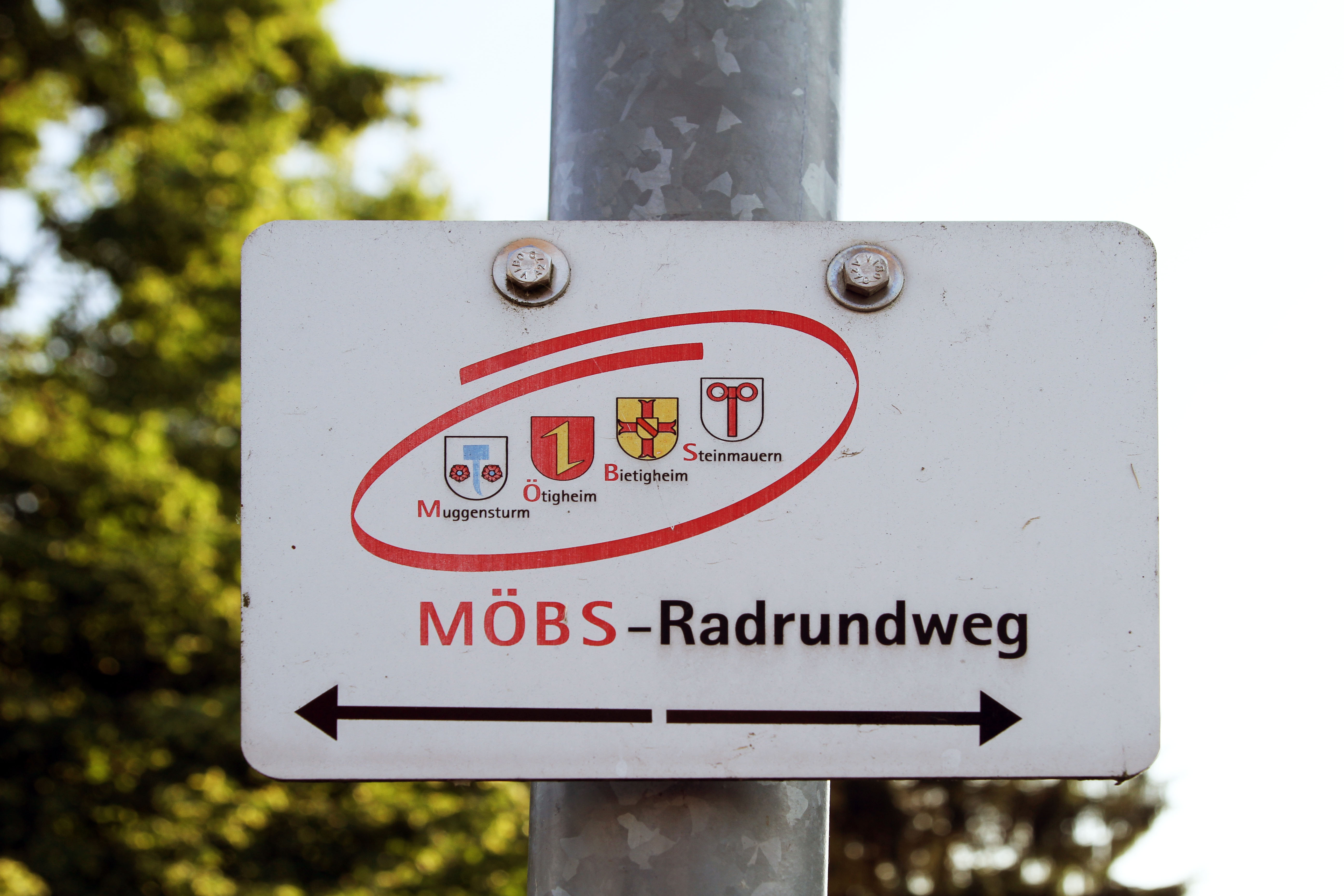 Schild mit dem Hinweis auf den MÖBS Radrundweg in Bietigheim.